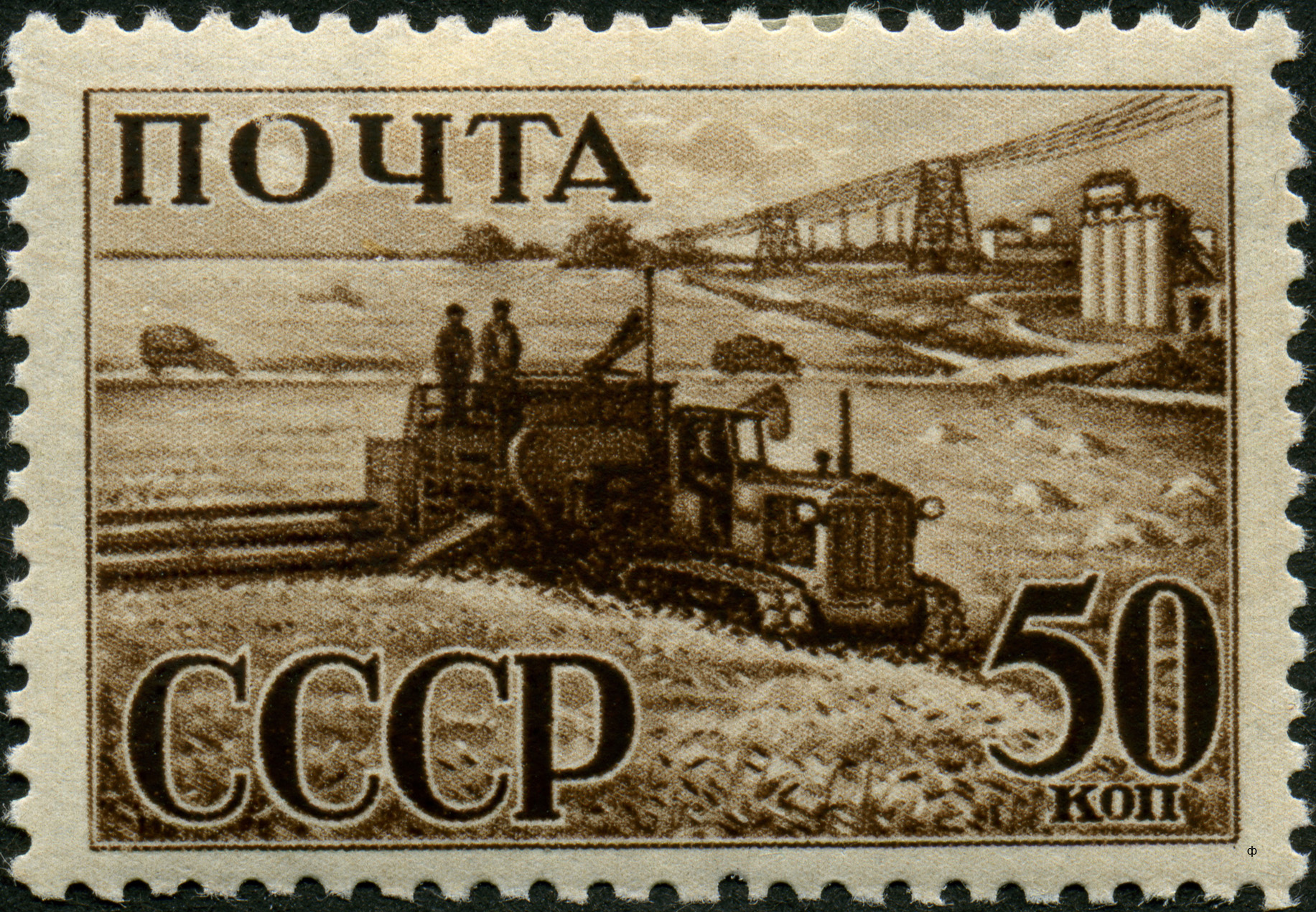 Почтовая марка СССР из серии «Индустриализация в СССР», выпущенная в январе 1941 года. На марке изображён комбайн (самоходных комбайнов тогда ещё не было, это прицепной комбайн). Художник — Ф.Козлов. Номер по каиалогу ЦФА — 784. Тираж — 2 млн.